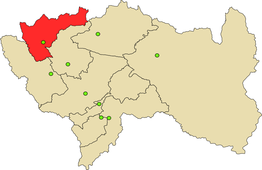 Mapa de Provincia de Junín en Perú